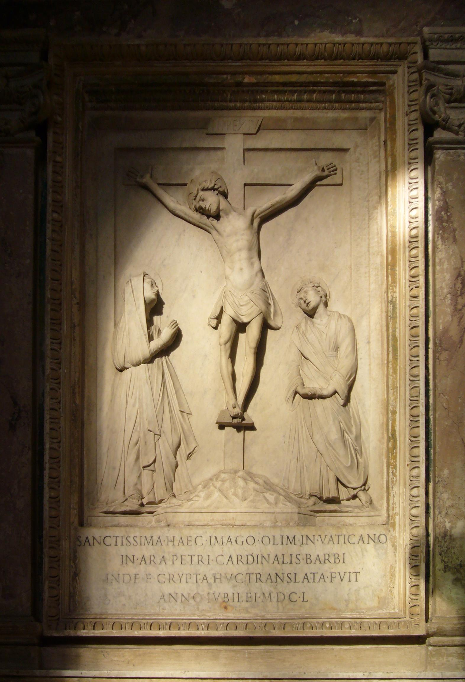 Roma, Chiesa di Santa Balbina: Crocifissione per il monumento funebre di Paolo II di Mino da Fiesole.